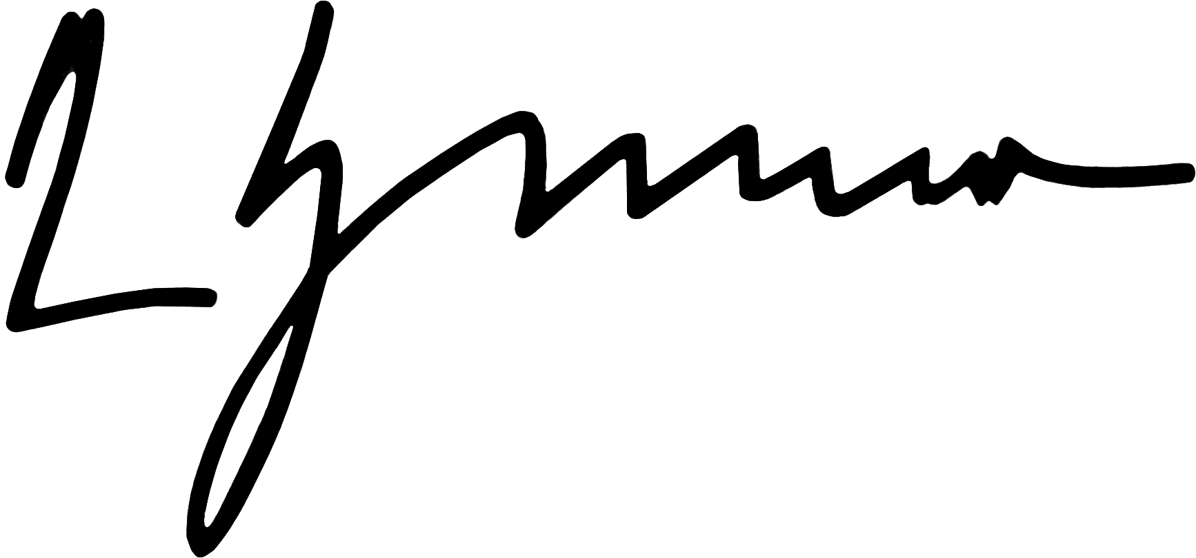 Роспись Президента Украины Леонида Кучмы